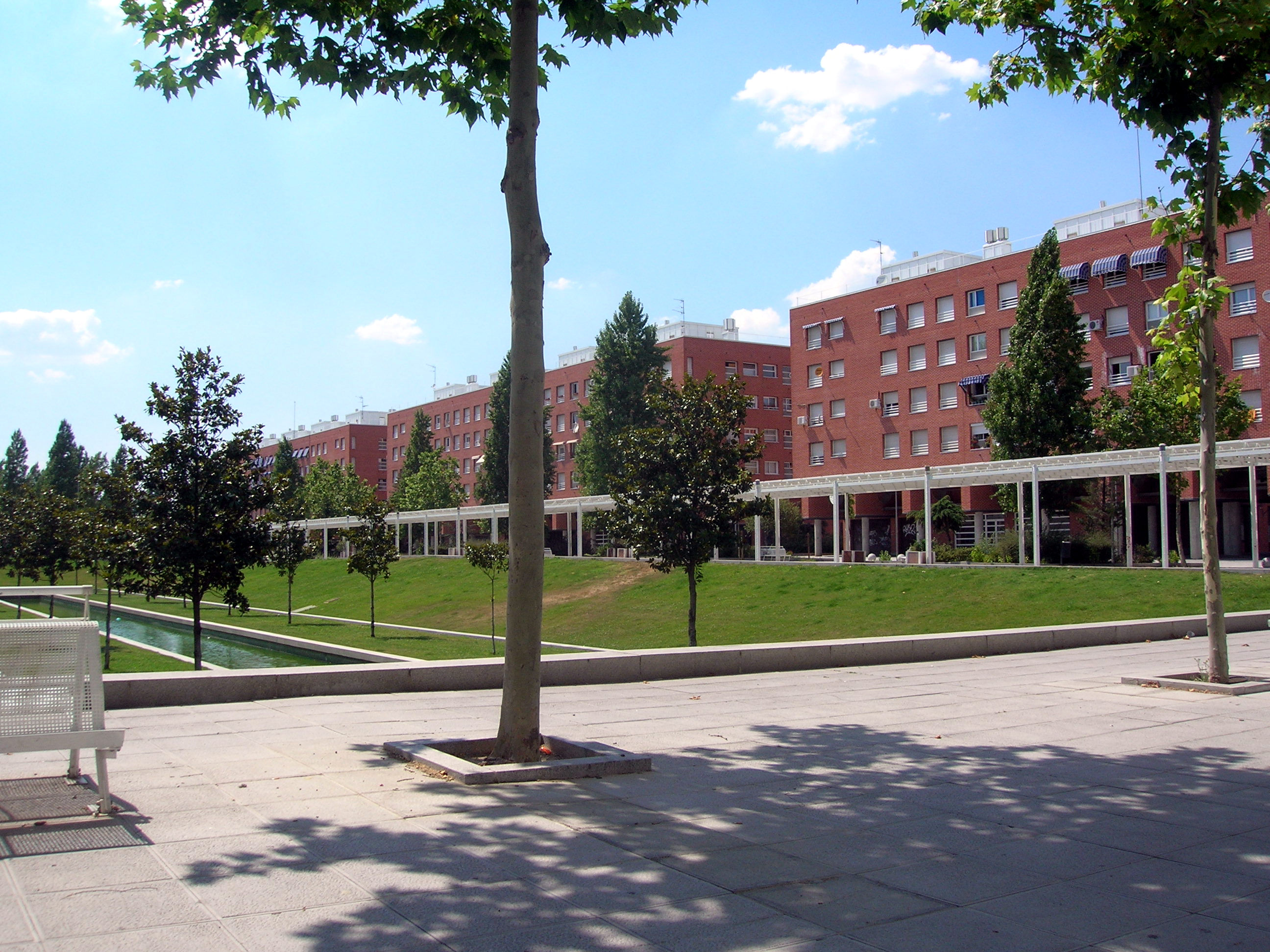 Plaza del 21 Marzo